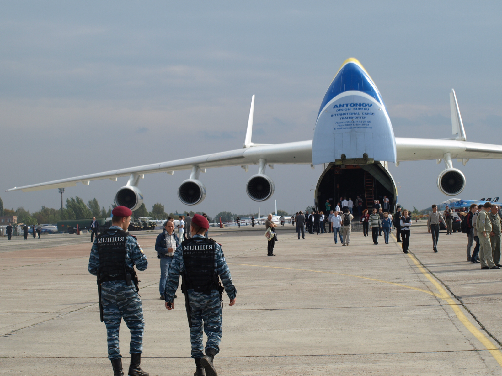 Спецпідрозділ "Беркут": Спецпідрозділ "Беркут" під час охорони громадського порядку на авіашоу